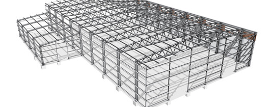 Металлокаркас для ШМБ